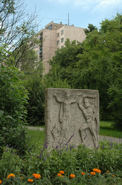 Dunaújvárosban egy római kori emlékmű másolata.